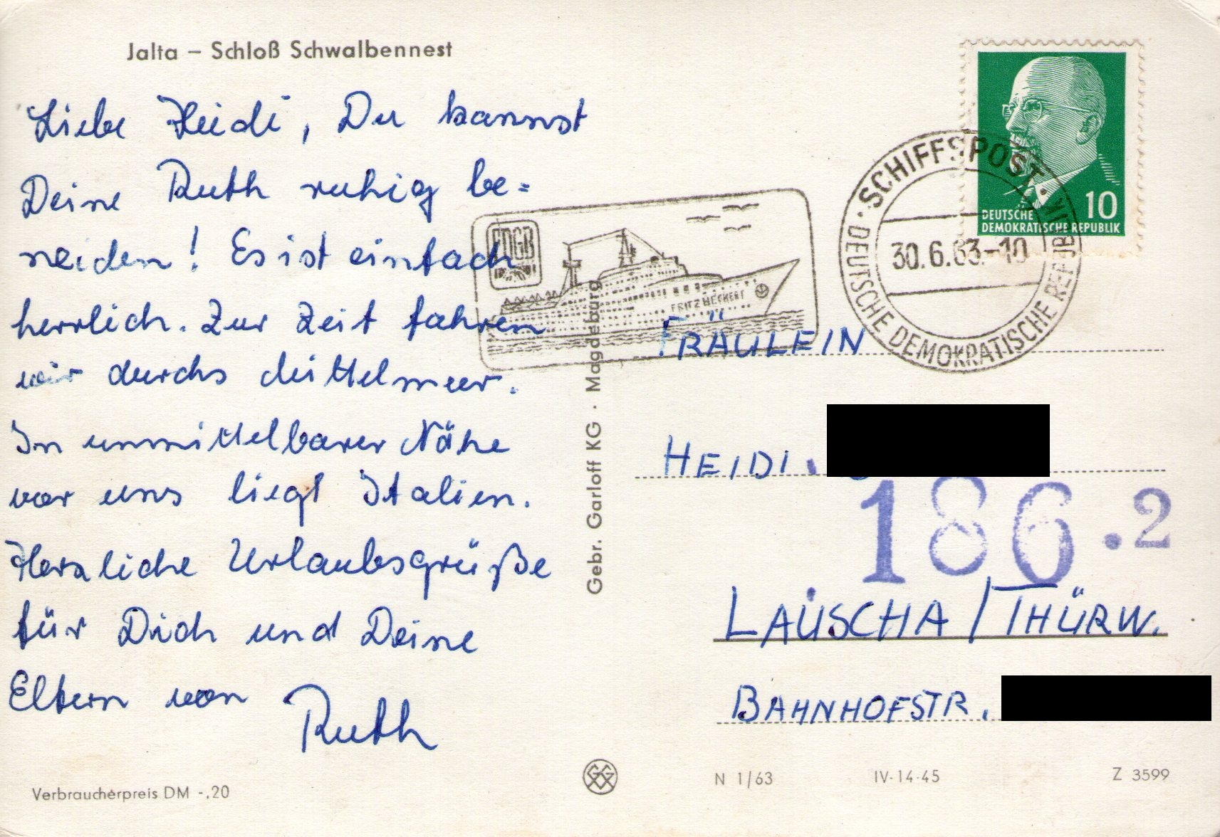 Schiffspost von 30. Juni 1963 – 10 Uhr: Mit dem DDR-Freier Deutscher Gewerkschaftsbund (FDGB)-Urlauberschiff "Fritz Heckert" versandte Ansichtspostkarte, welche das Schloss Schwalbennest auf Jalta zeigen soll. Geschrieben wurde die Karte jedoch im Mittelmeer vor der Küste Italiens.